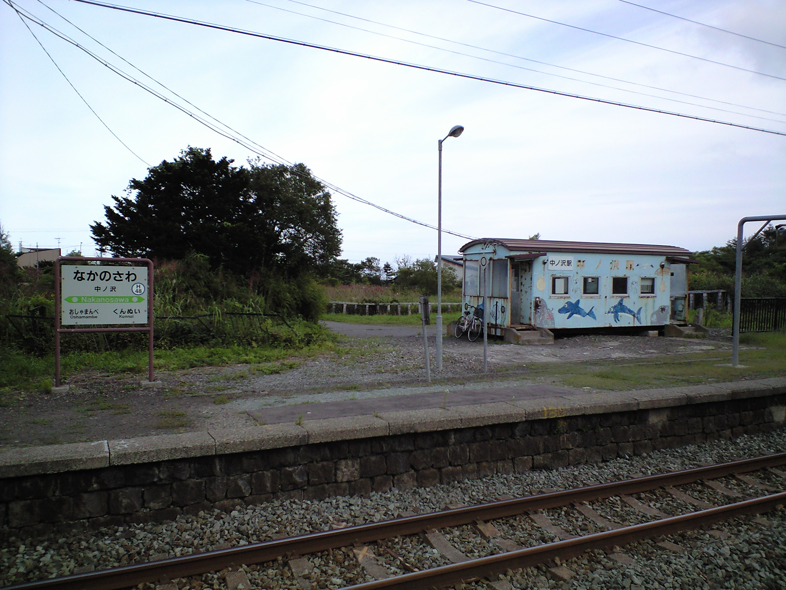 中ノ沢駅の駅名表と駅舎。